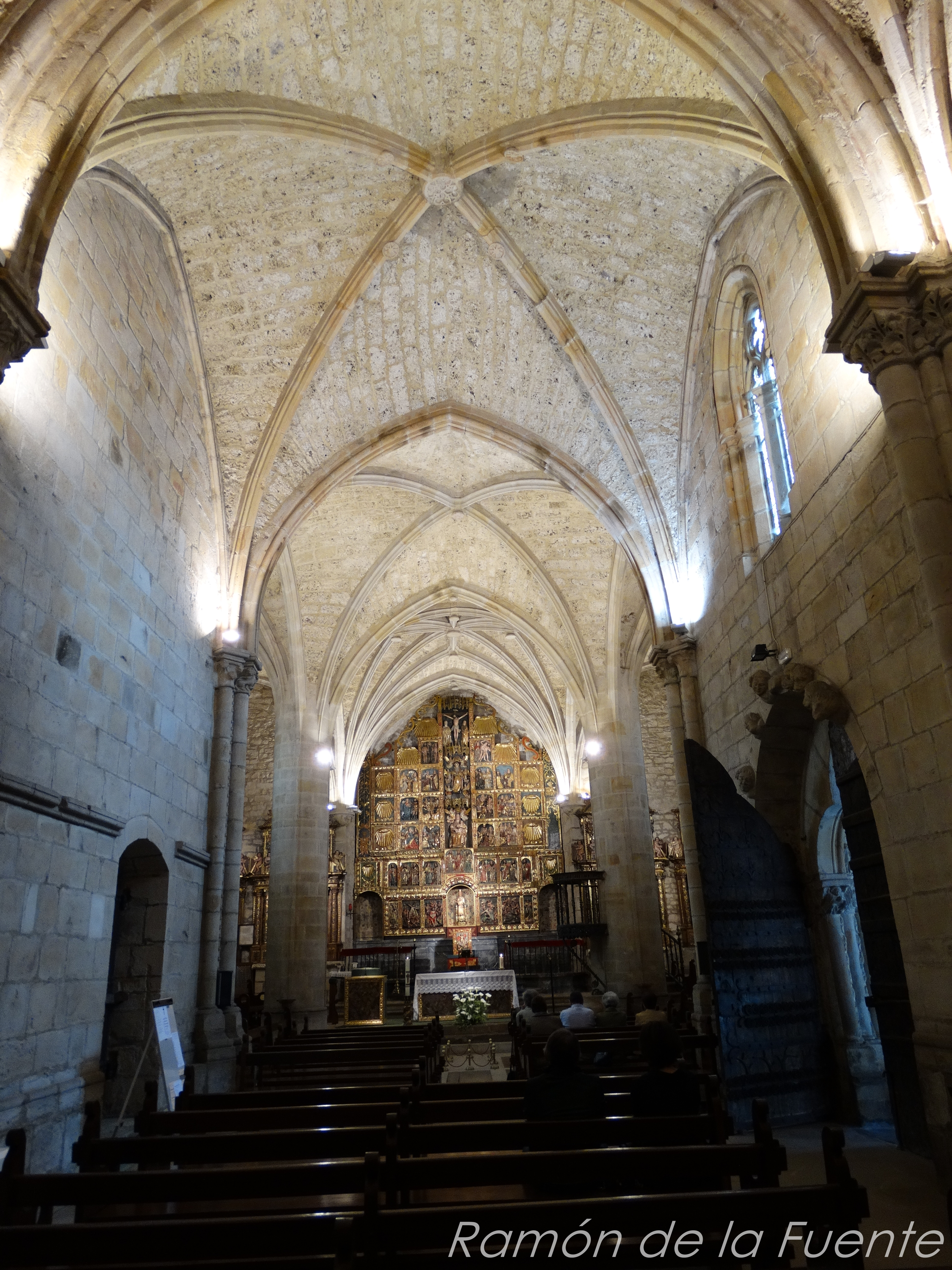 Interior de la iglesia desde el fondo de la misma